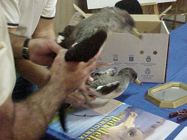 Calonectris borealis. Anillado de pardelas, Fuerteventura.